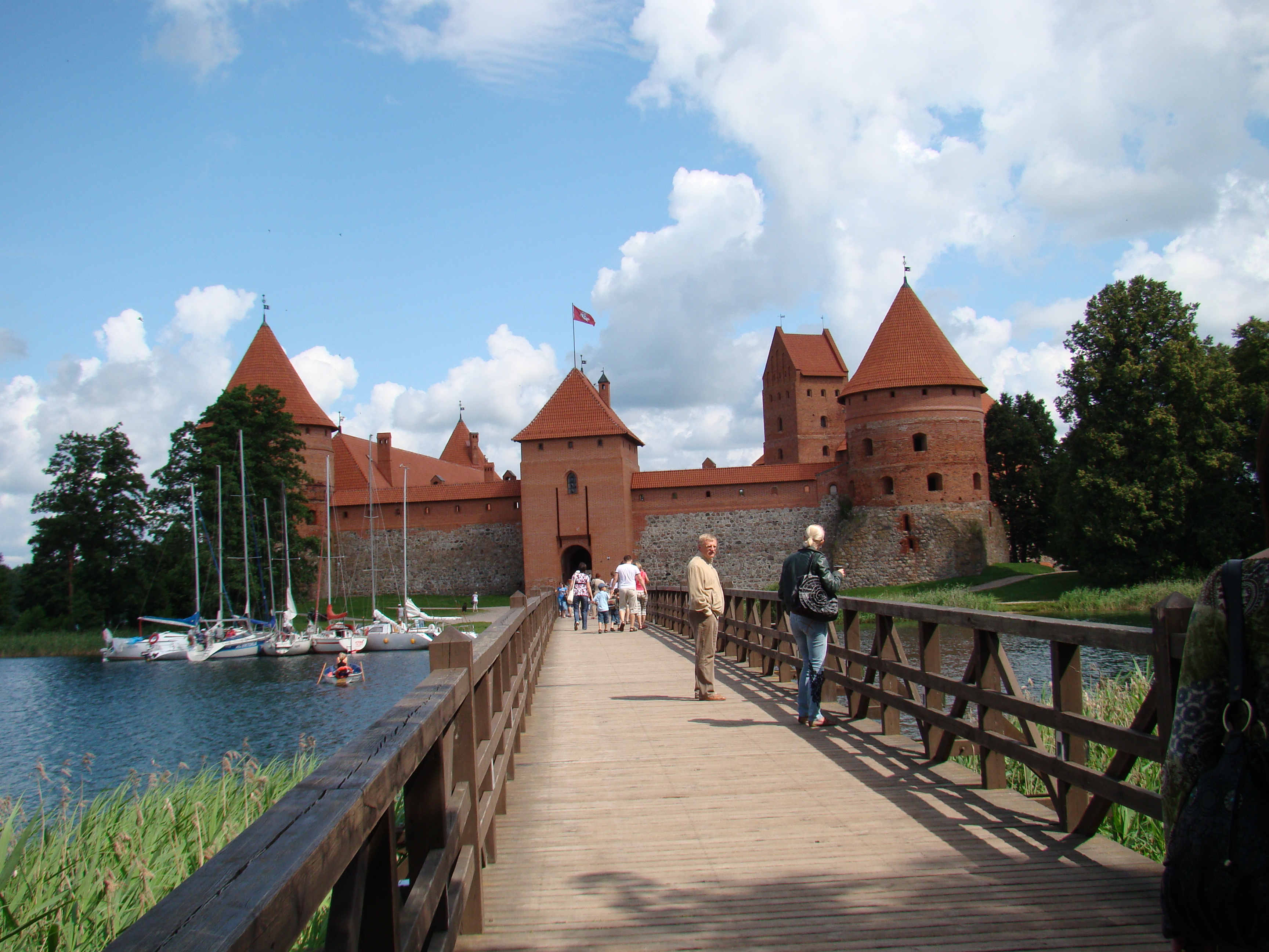 Trakų salos pilis